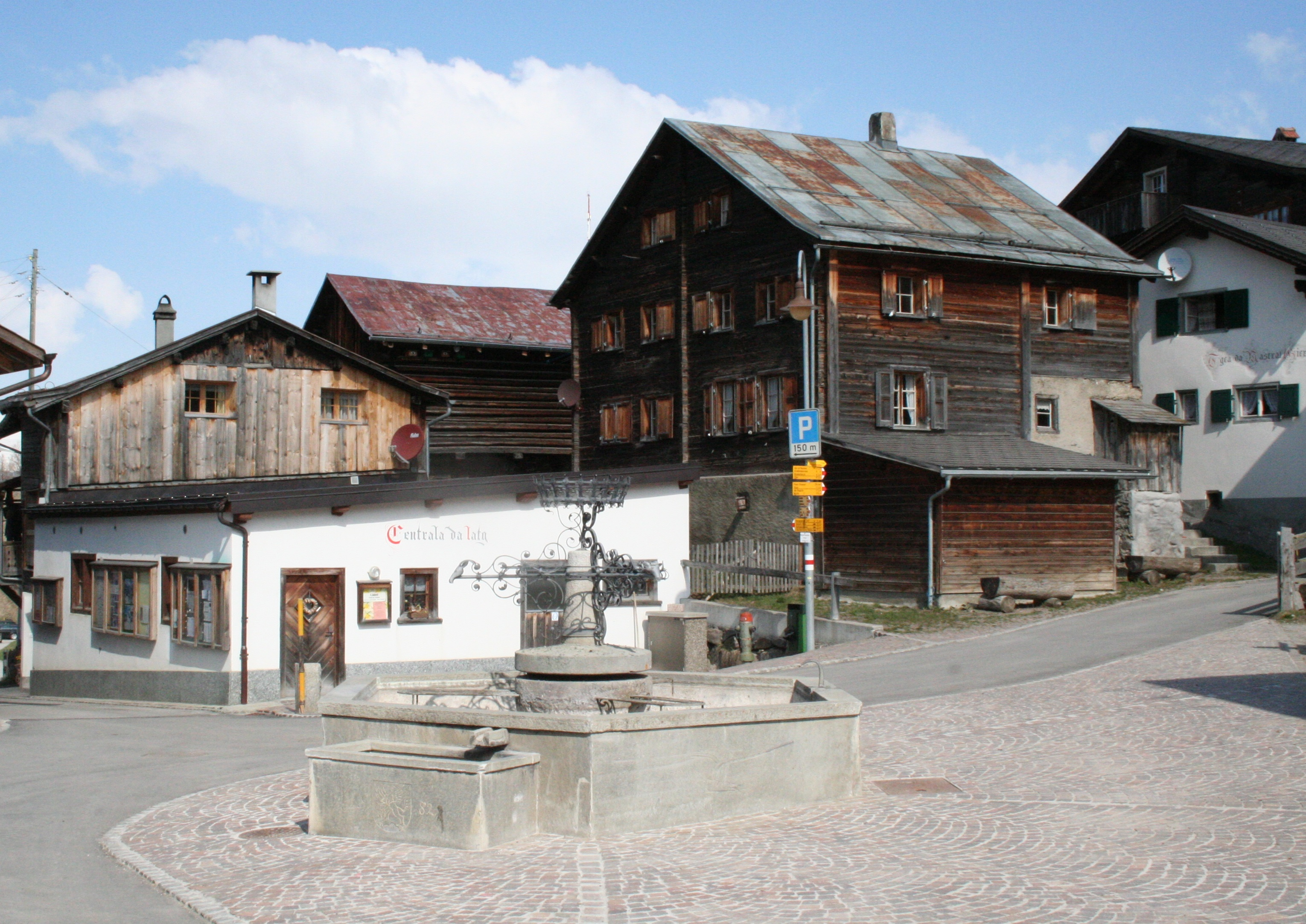 Brunnen in Feldis